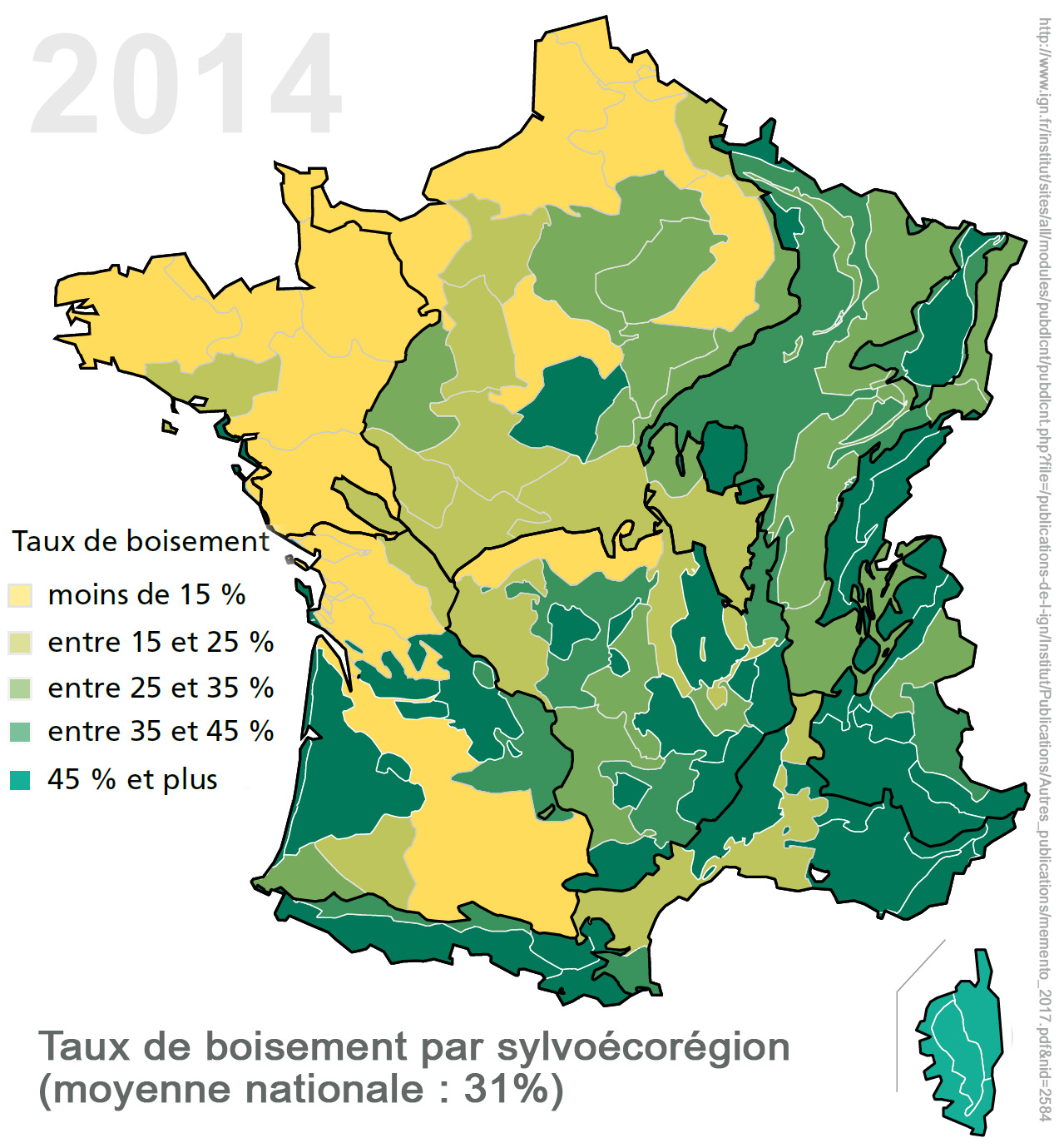 Forêt en 2014 par sylvoécorégion IGN publié 2017 (estimation) d'après données et graphiques 2014 collectées par l'IGN et publiés en 2017 (IGN (2017) Le mémento ; Inventaire forestier 2017)